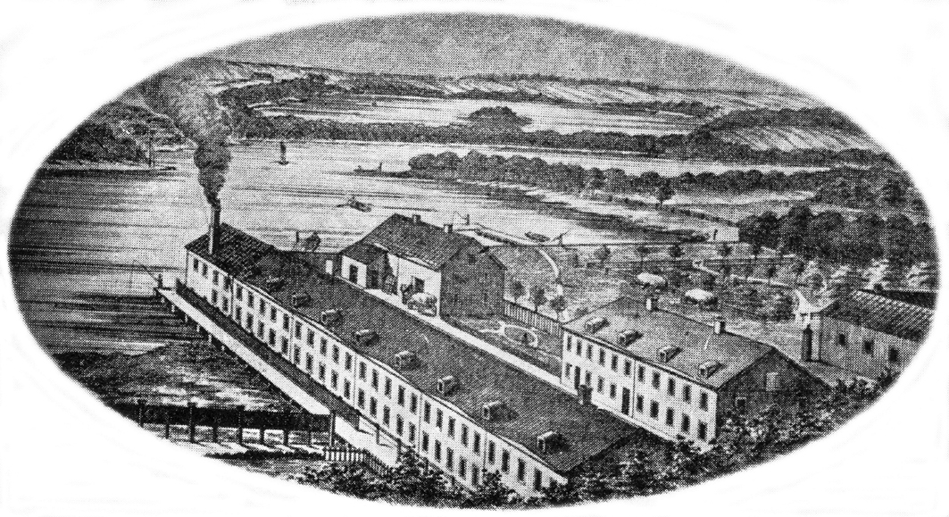 Katalogbild av Wahlqvistska Klädesfabriken i Växjö